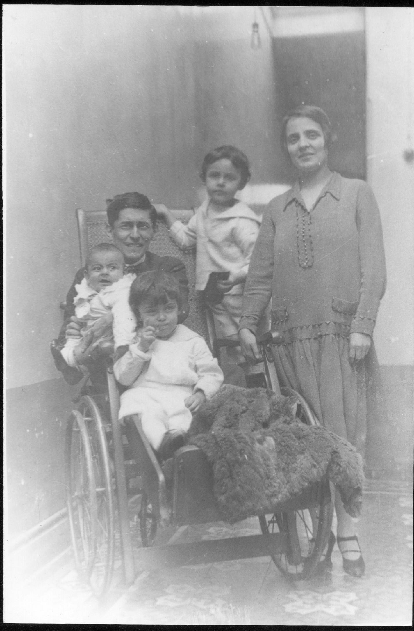 En el patio de la casa de Washington (Lima) - Izquierda, con su esposa Anita, y sus hijos Sandro, Sigfrido y José Carlos. Año 1927. Puede usarse libremente bajo licencia CC mencionando en los créditos "Archivo José Carlos Maríategui, Lima, Peru (